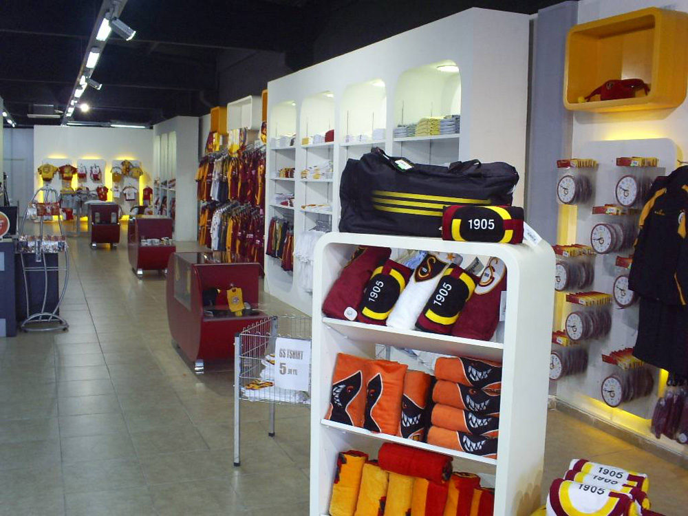 Galatasaray Store